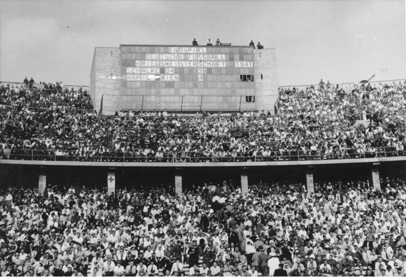 Berlin, Zuschauer beim Fußball-Endspiel Rund um das Fussball-Endspiel! 100 000 im Berliner Olympia-Stadion! Eine Bild-Nachlese vom Rande des grössten deutschen Sport-Ereignisses. Blick auf die dichtbesetzten Tribünen und auf die Resultattafel am Schluss des Endspiels zur Deutschen Fussball-Kriegsmeisterschaft 1941. 22.6.41 Scherl/ Schirmer-Sportbild